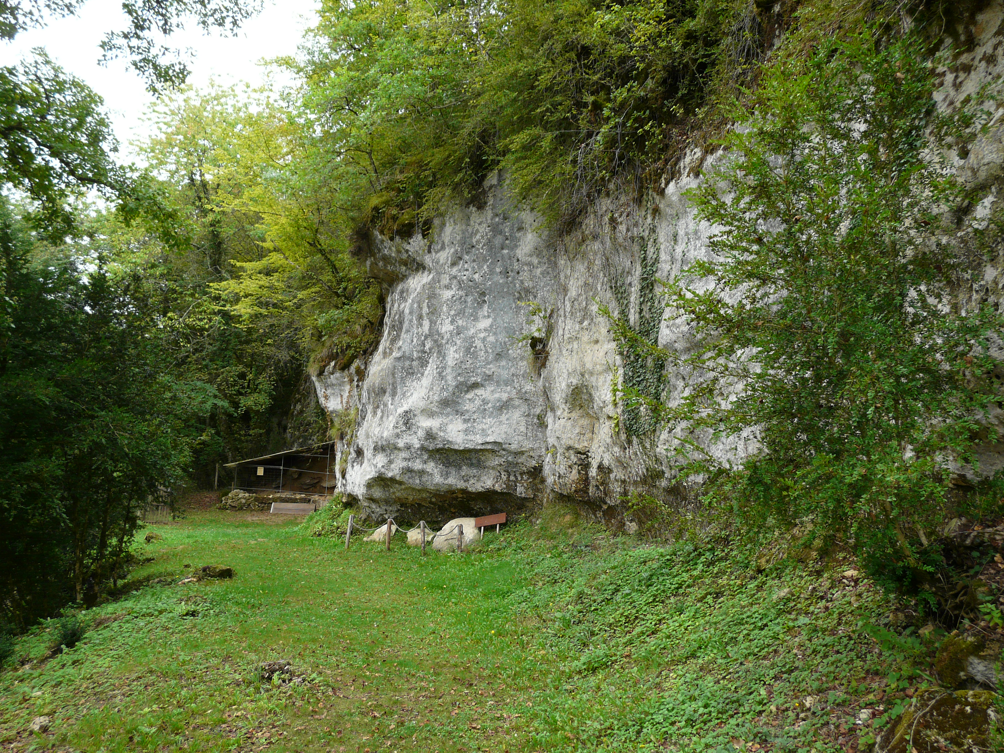 L'abri Reverdit, site préhistorique sur la commune de Sergeac, dans le vallon de Castel Merle, Dordogne, France. .